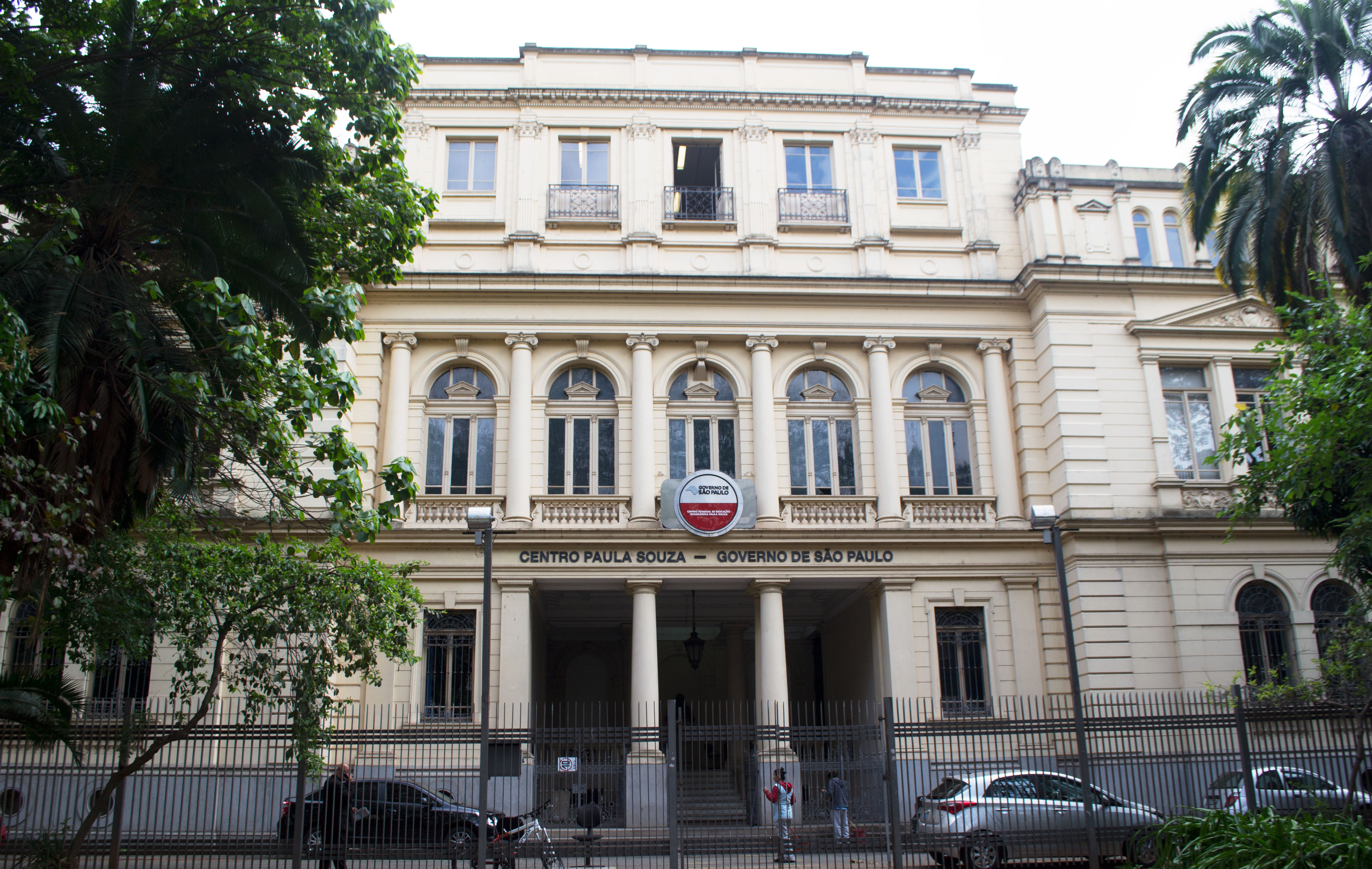 Atual Centro Paula Souza, antiga Escola Politécnica, em São Paulo (SP), Brasil